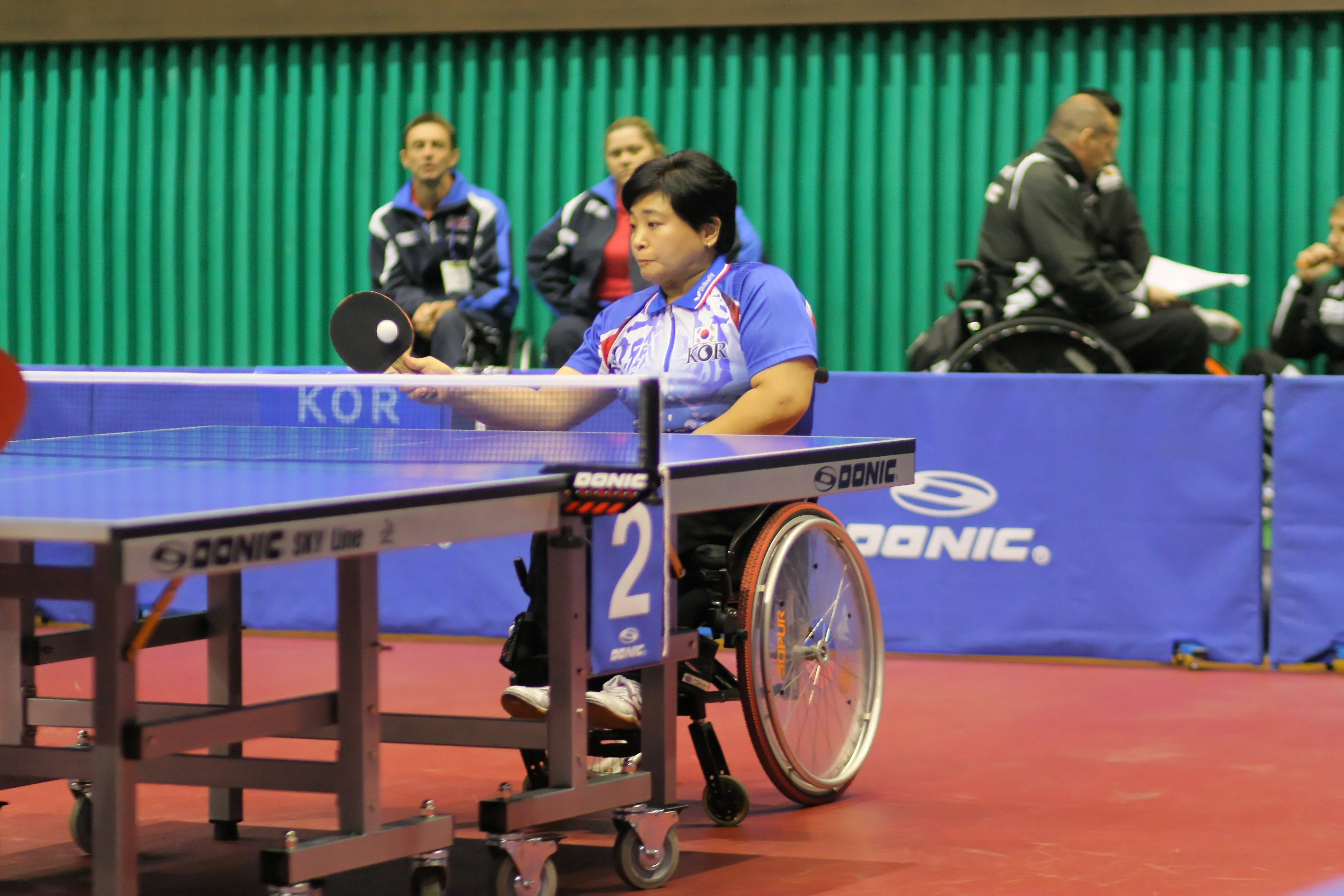 IMG_8438_DxO